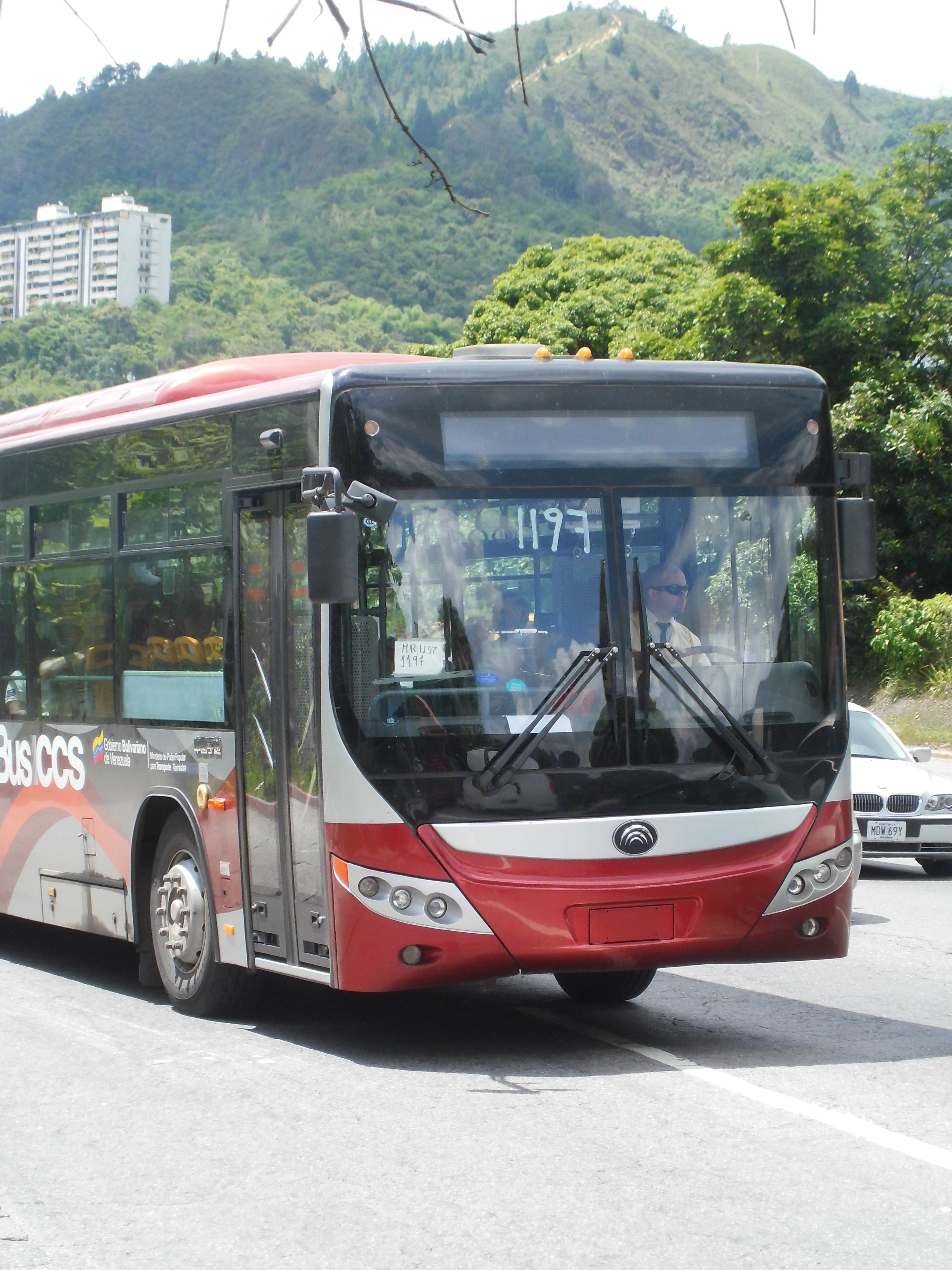 BusCaracas